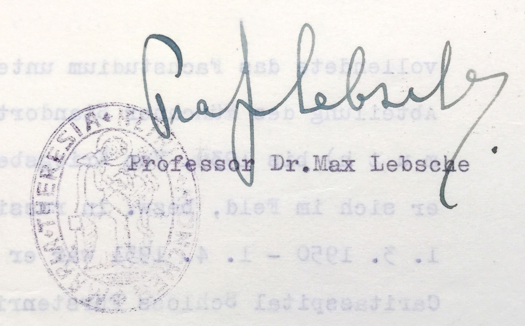 Unterschrift von Professor Dr. Max Lebsche